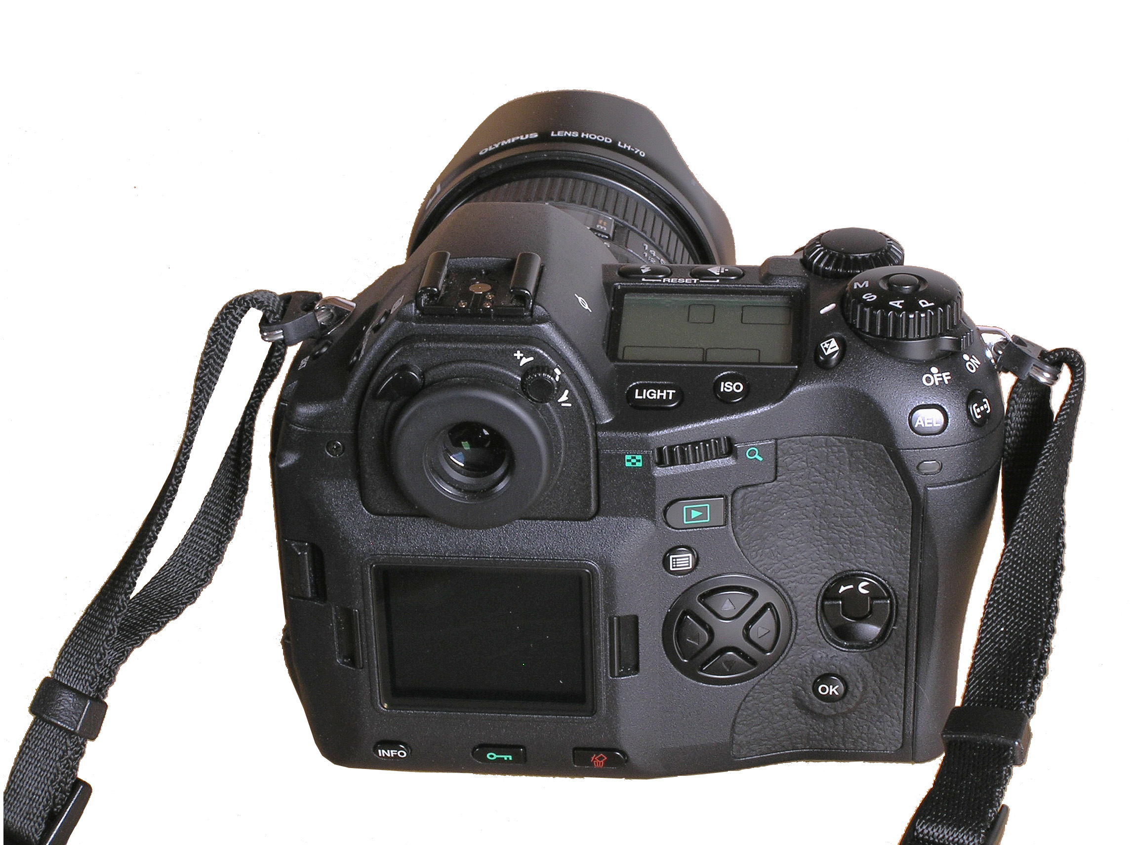 Olympus E-1 von hinten und etwas von oben